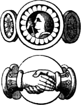 Gimmel Ring